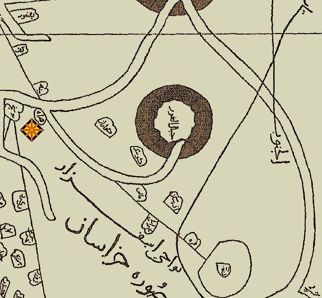 بریده‌ای از نقشه «خراسان» مندرج در کتاب «صورة‌ الارض» تالیف این حوقل (درگذشته در سال‌های پس از ۳۶۷ هجری)؛ ترسیم شده در قرن چهارم هجری؛ در این بریده نقاط مهم خراسان جنوبی آمده است که دربرگیرنده ربع هرات می‌باشد